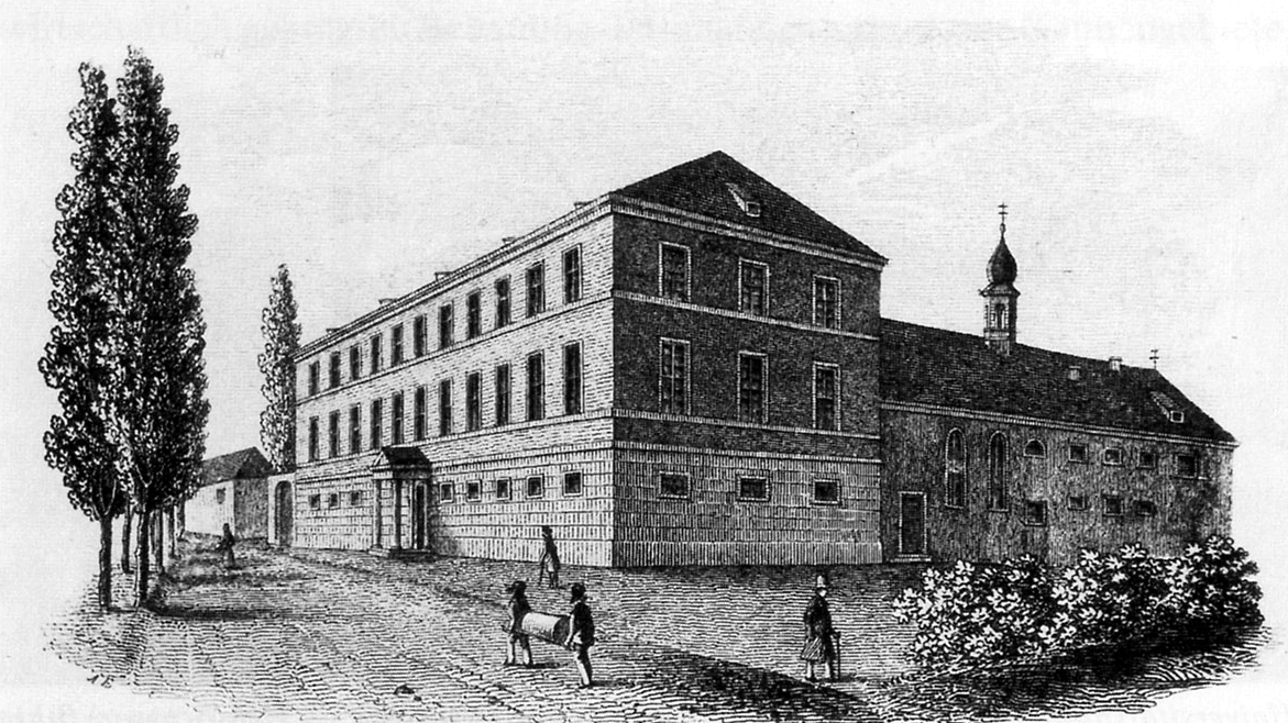 Anicht des Landkrankenhauses (Wilhelmspital Fulda) von Norden, 1840 (heute: Städtische Musikschule Fulda)